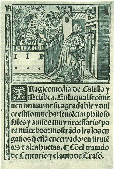 Portada de la edición con el Auto de Traso (Toledo, 1526)